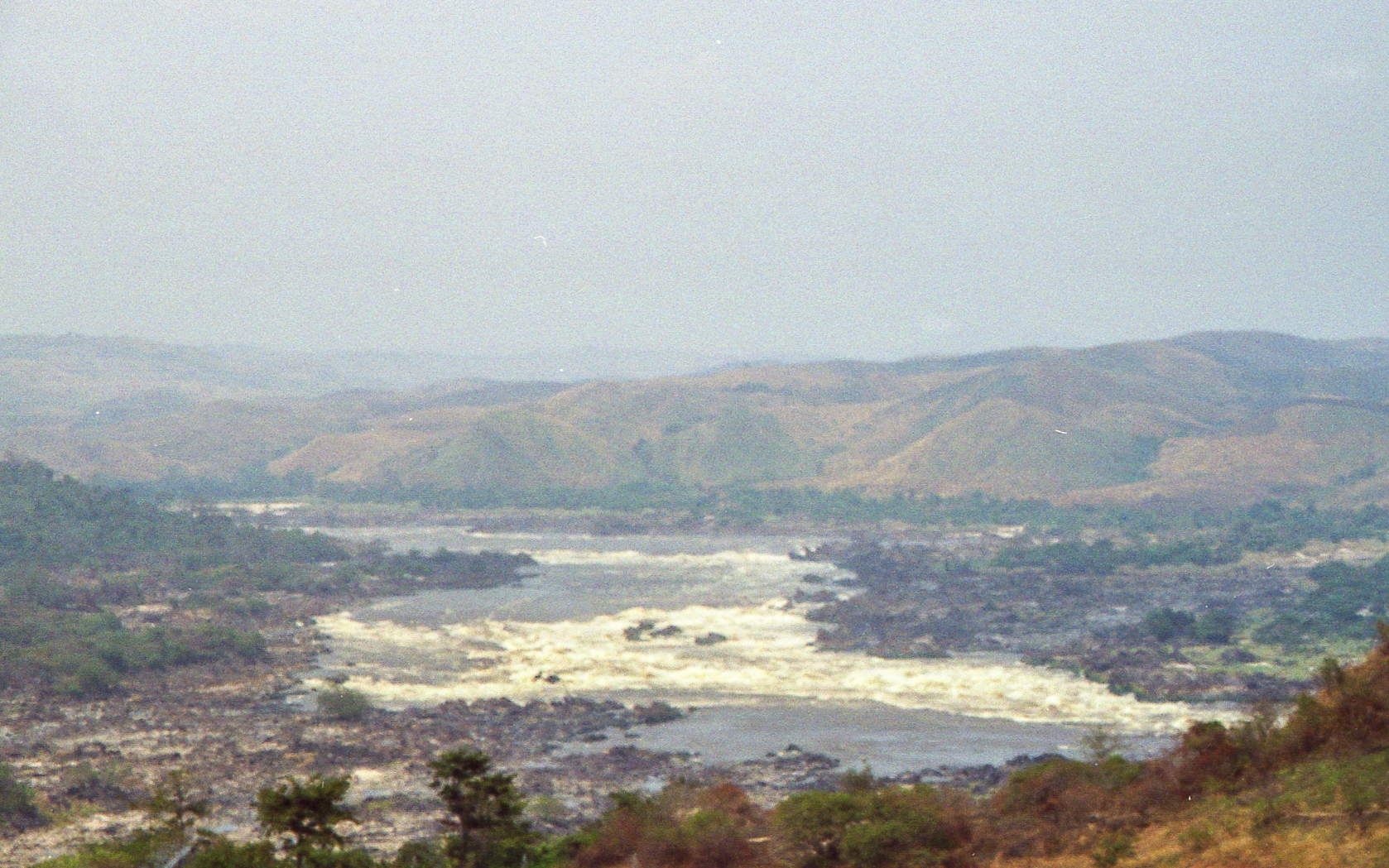 Vue du barrage d'Inga